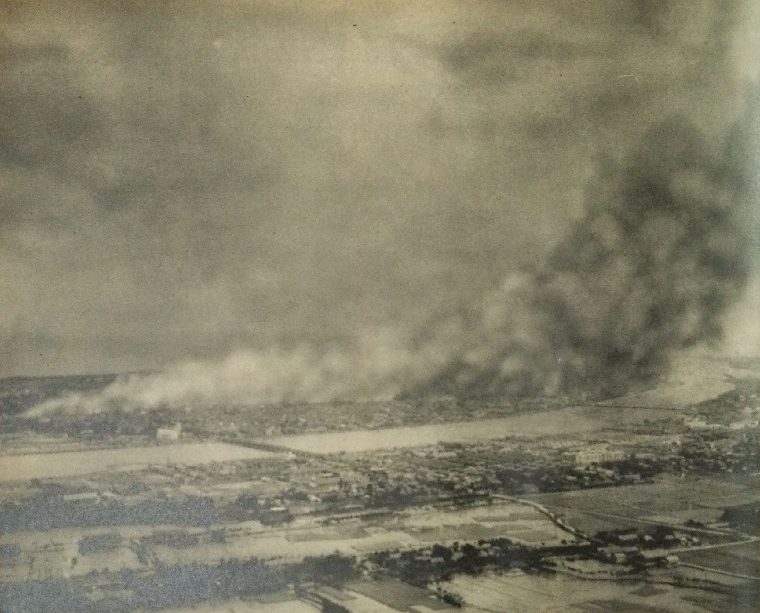 新潟大火